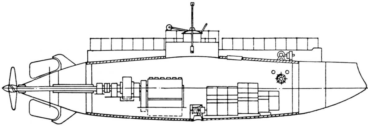 Продольный разрез ПЛ "Дельфин"